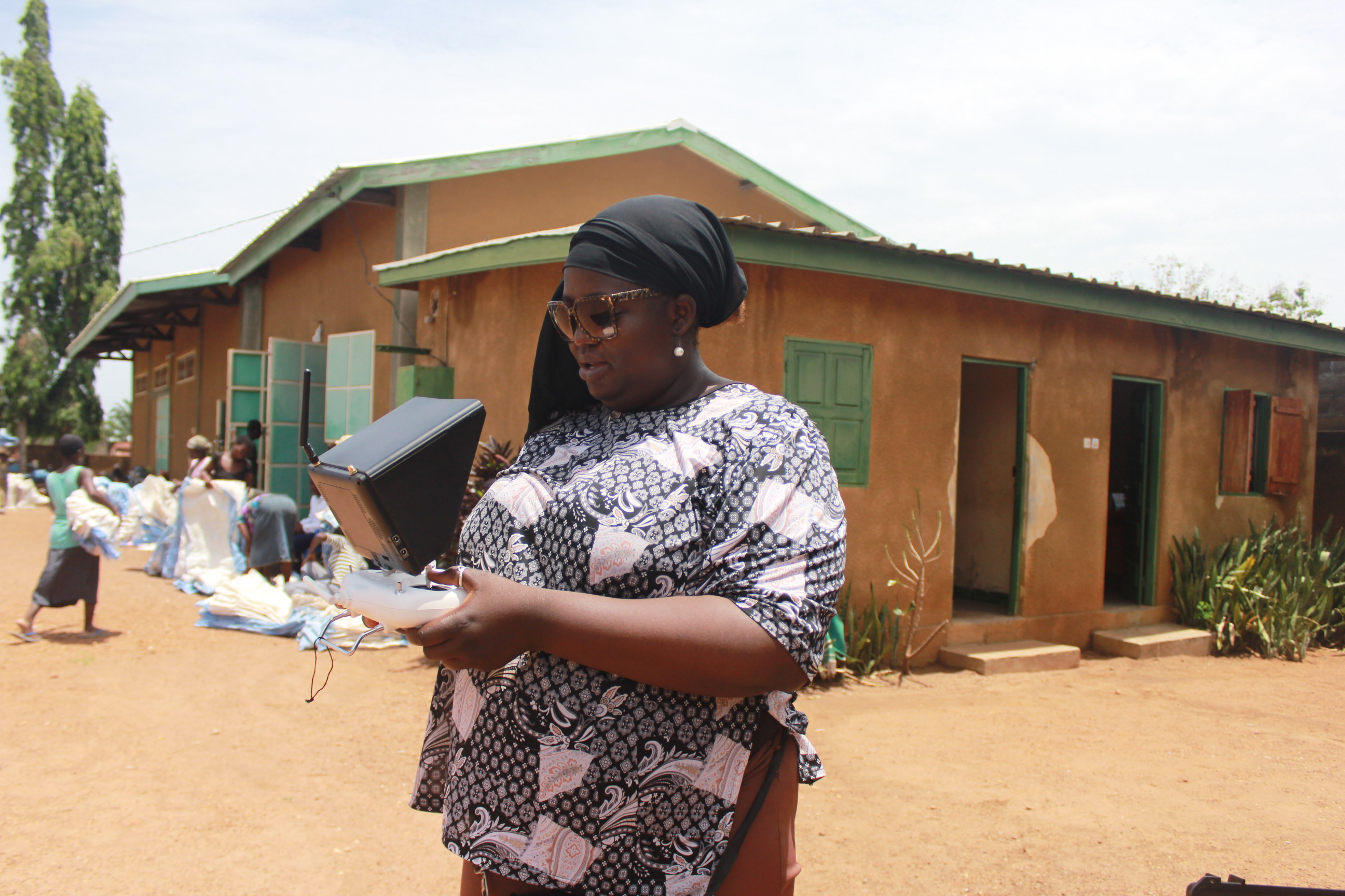 Prise de vues via drone lors d'un tournage de film documentaire This is an image of "African people at work" from Togo